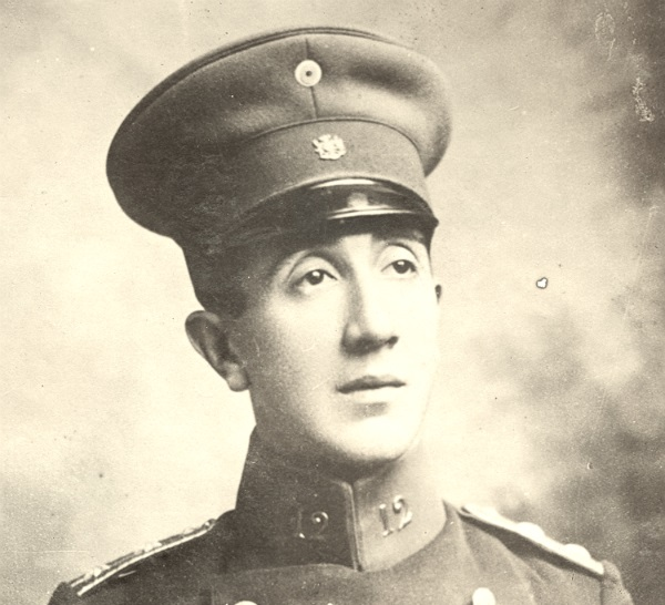 Teniente 1º Alejandro Bello Silva.